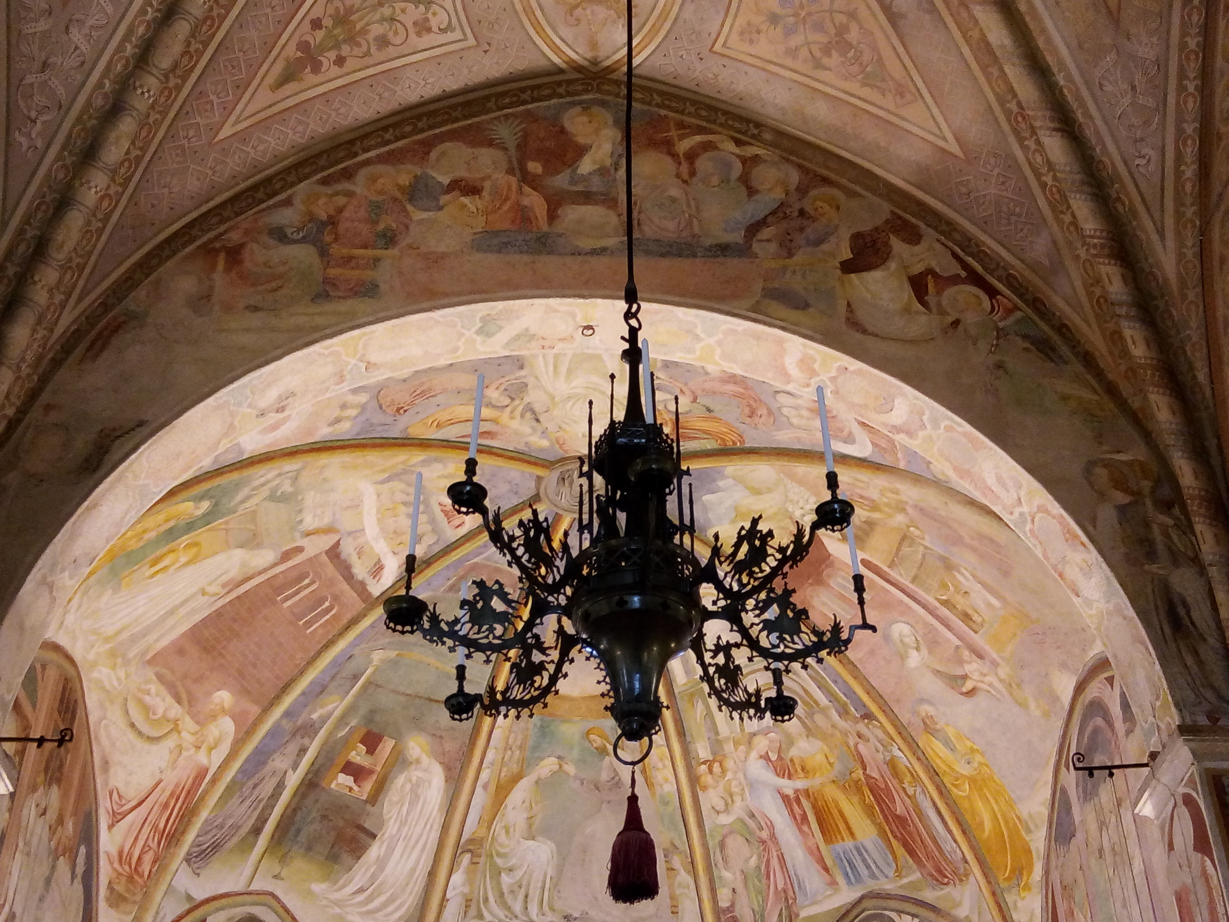 Lampadario quattrocentesco Collegiata Castiglione Olona